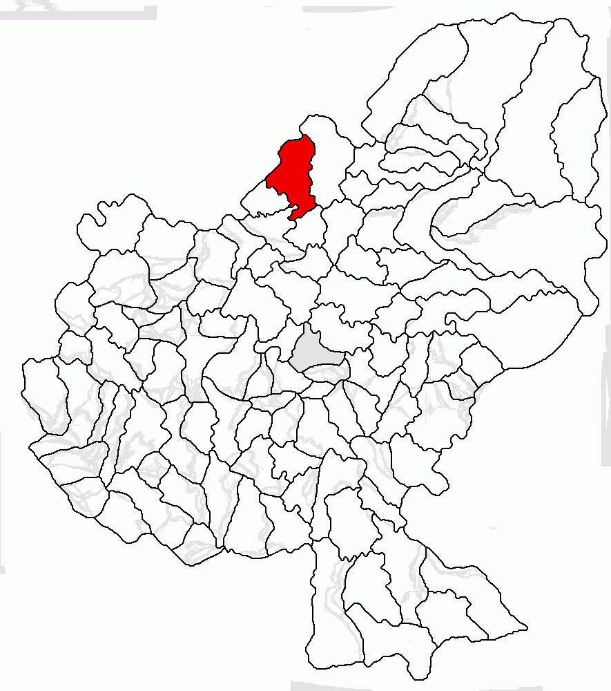 Categorie:Hărţi ale judeţului Mureş